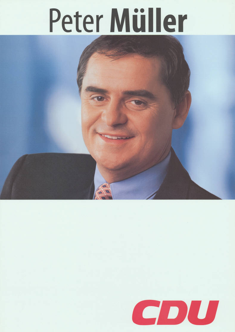 Peter Müller CDU Abbildung: Porträtfoto Kommentar: Datierung nicht eindeutig. Plakatart: Kandidaten-/Personenplakat mit Porträt Objekt-Signatur: 10-031 : 892 Bestand: CDU-Plakate (10-031) GliederungBestand10-18: Personenplakate Lizenz: KAS/ACDP 10-031 : 892 CC-BY-SA 3.0 DE